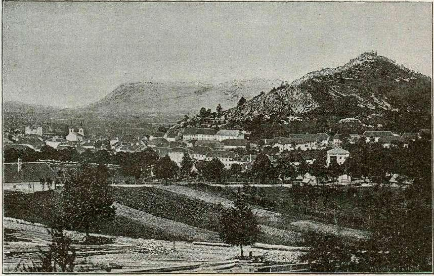 Postojna.